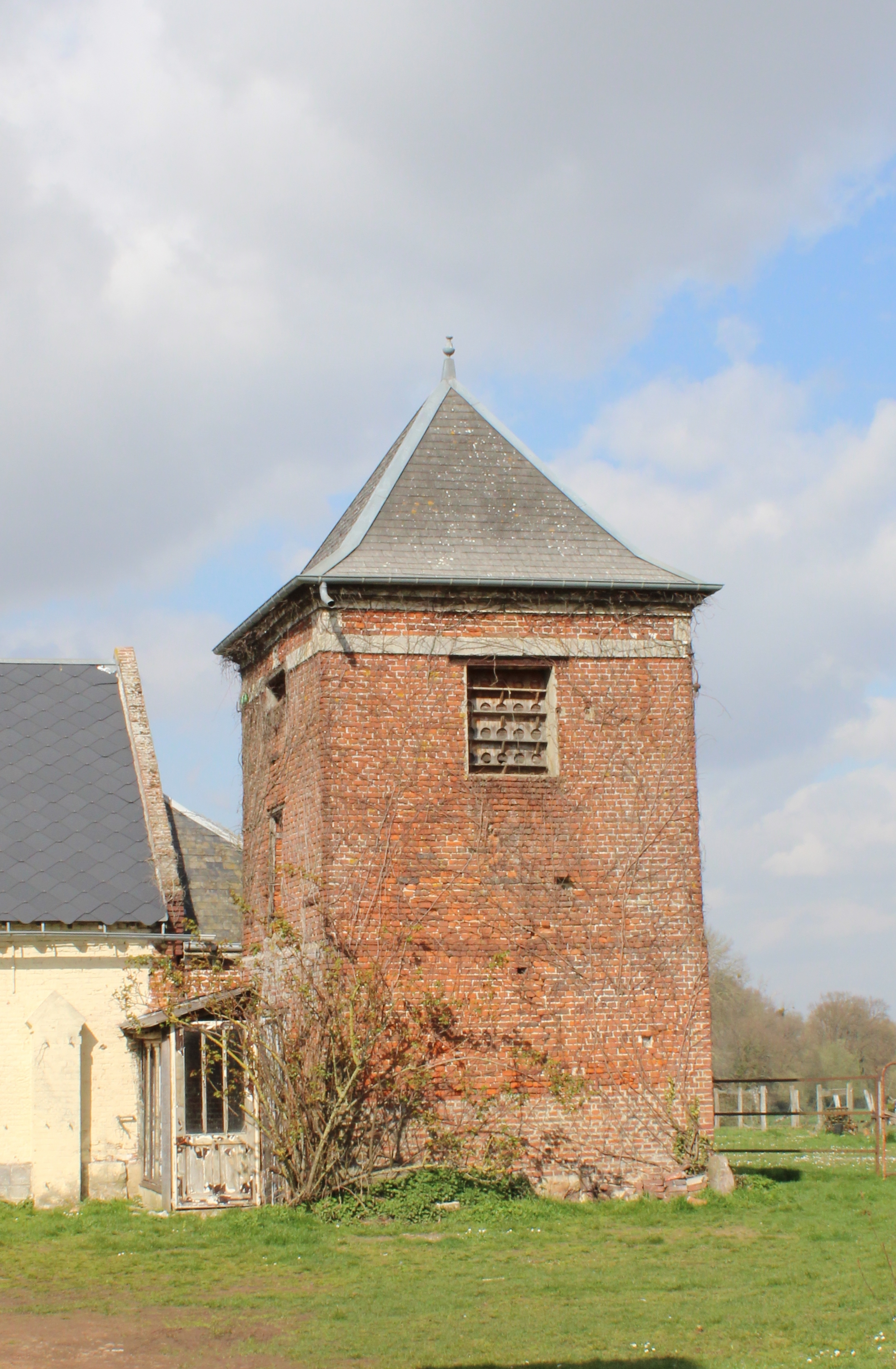 Le pigeonnier.